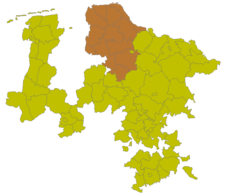 Kreise im Regierungsbezirk Stade der Provinz Hannover 1905